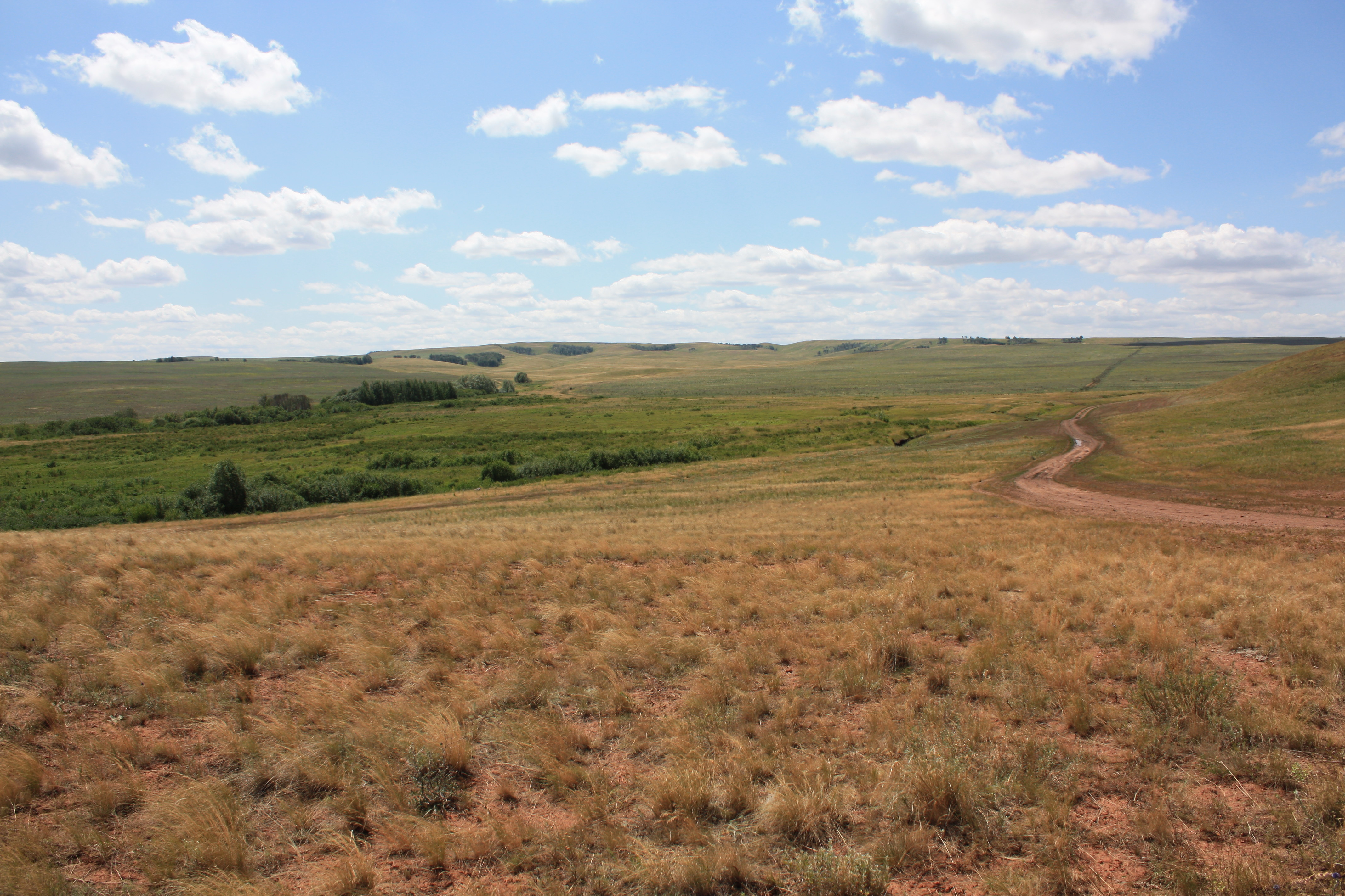 Бассейн речки Усолки